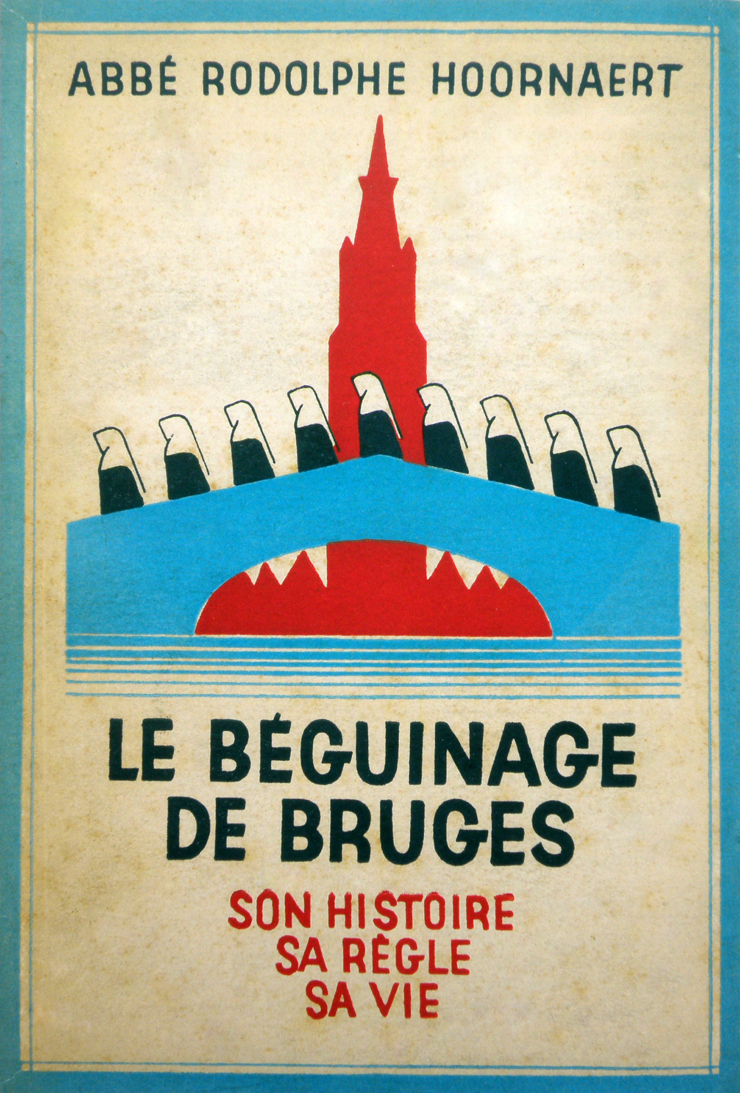 Couverture du livre le Béguinage de Bruges: son histoire, sa règle, sa vie, par Rodolphe Hoornaert (1930).